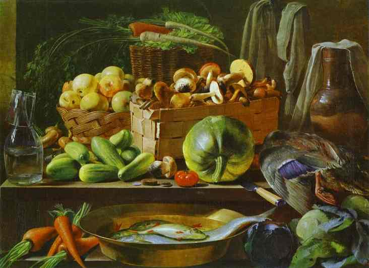 Нацюрморт (плады). 1839 г Still Life